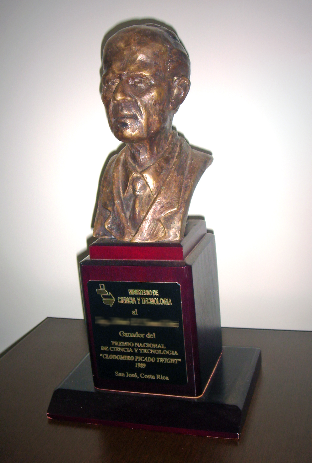 Estatuilla del Premio Nacional de Ciencia y Teconologia Clodomiro Picado Twight, Costa Rica